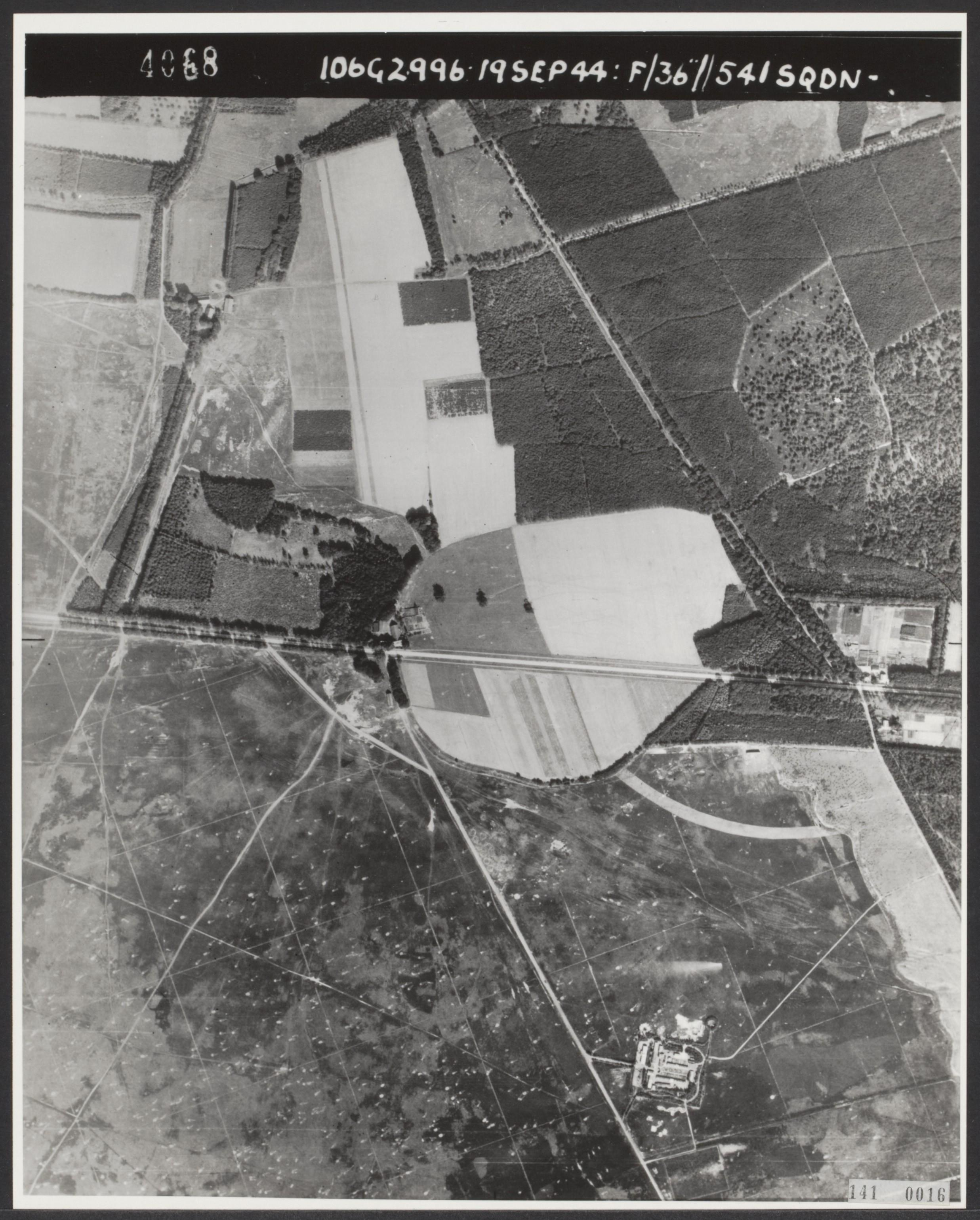 Luchtopname [Operatie Market Garden = Slag om Arnhem]. Parachutisten van de Vierde Parachutisten Brigade landen op de Ginkelse Heide tussen Wolfheze en Ede